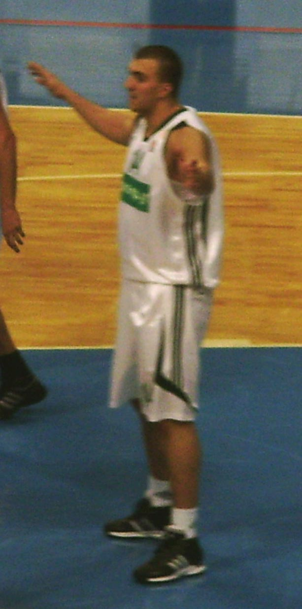 Nikola Peković PAO Efes Pilsen OAKA stadium